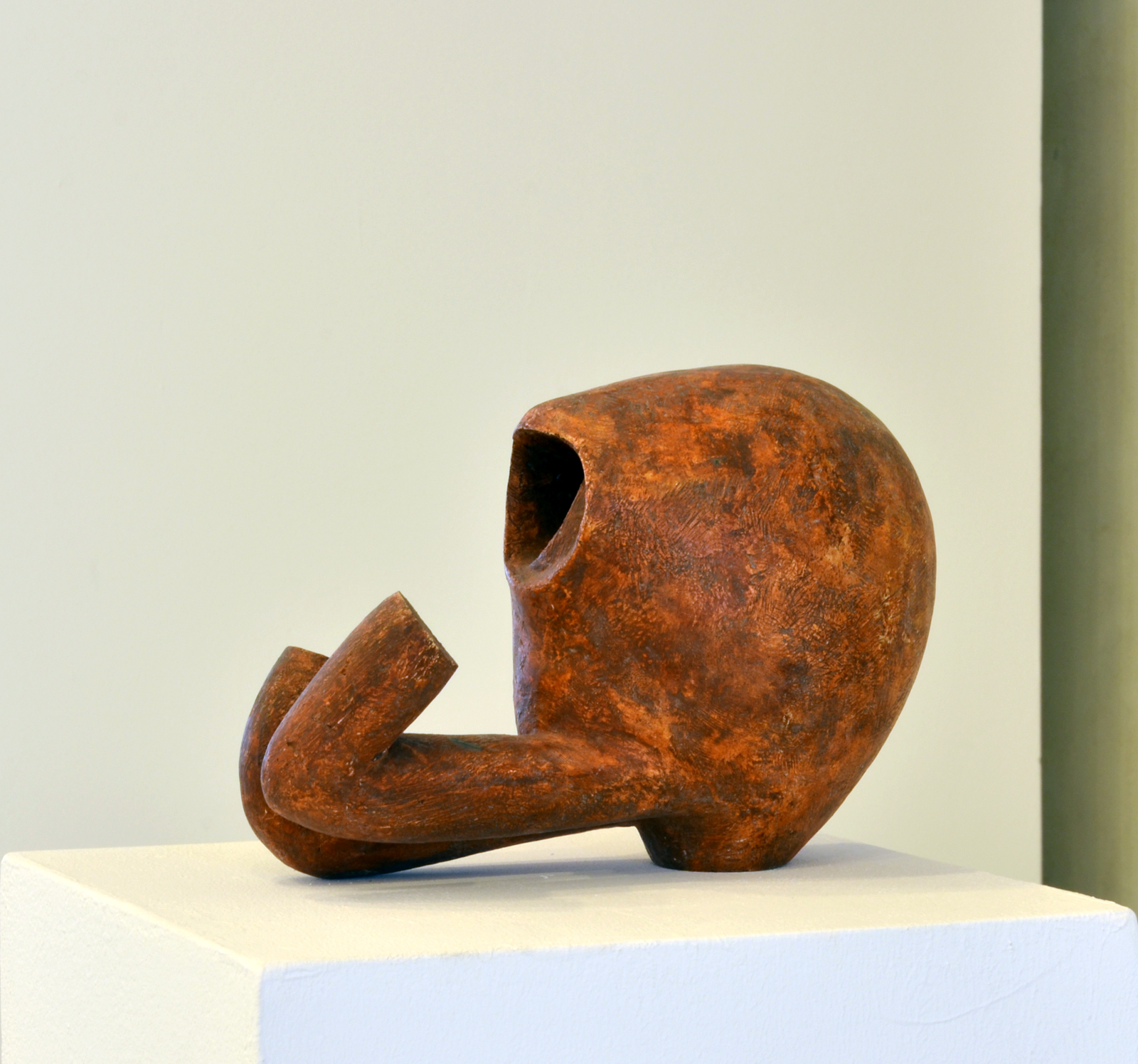 Zbyněk Sekal, Embryo (1967), patinovaná sádra